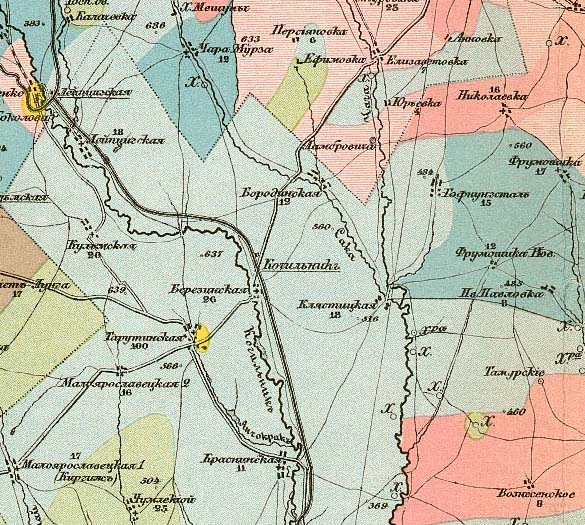 Этнографическая карта сельского населения Бессарабии